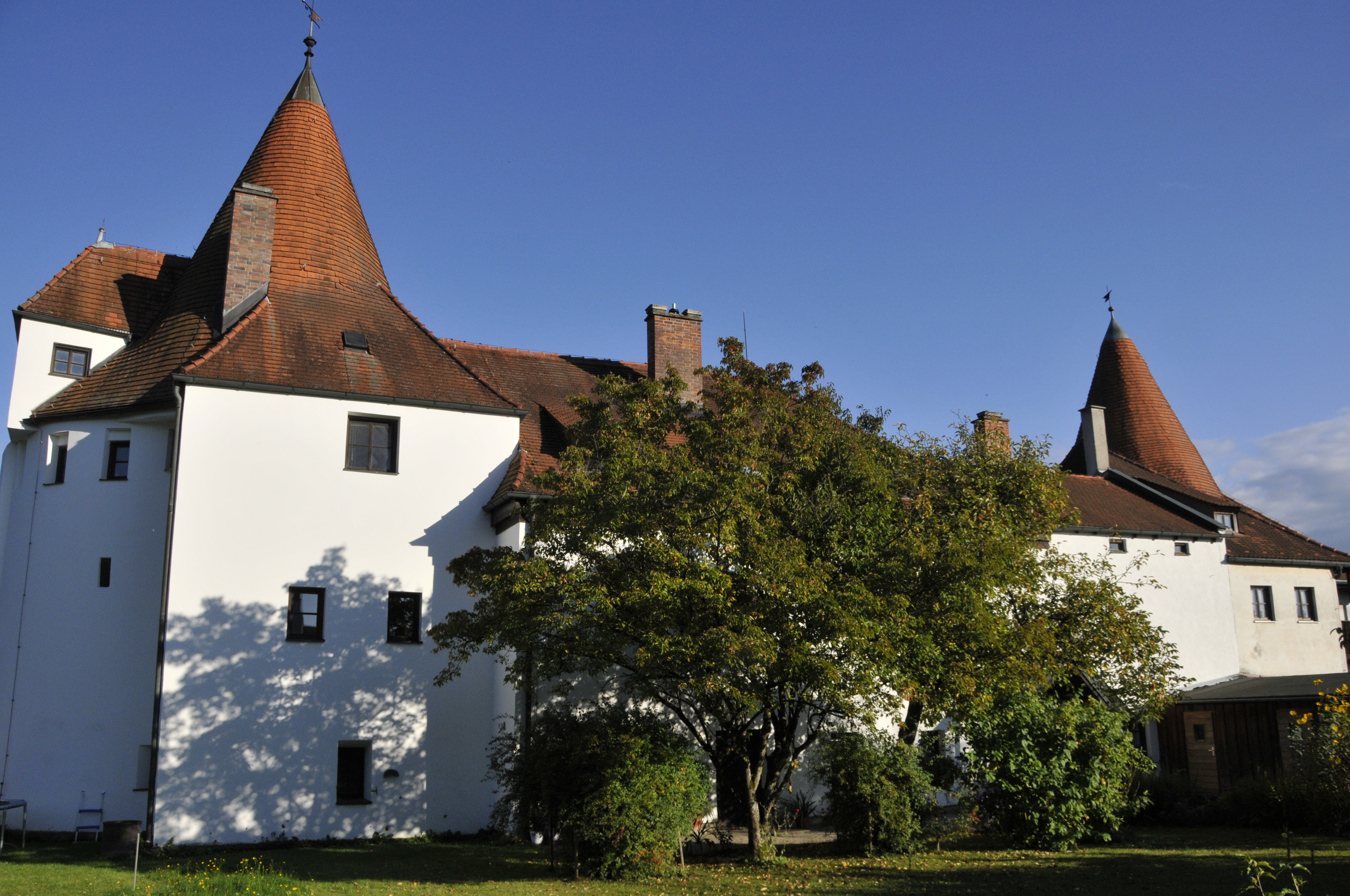 Burghausen, Burganlage, Kastenamt